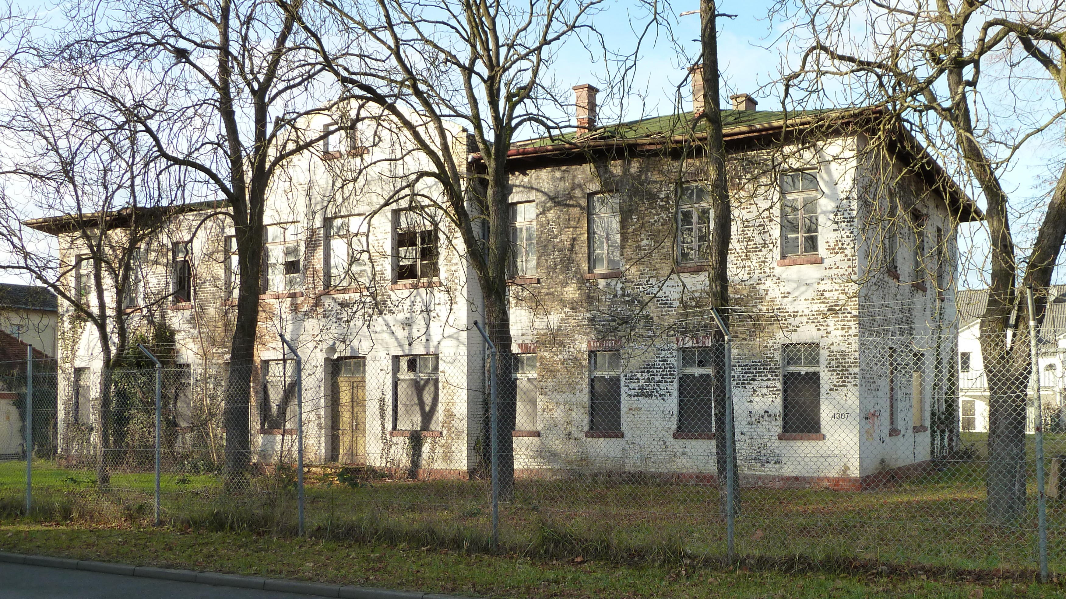 Griesheim-Alte-Kaserne, Lilienthalstraße